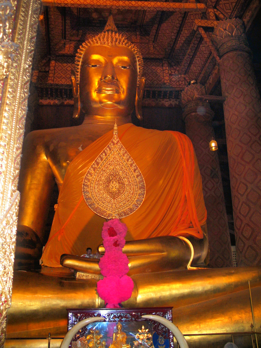 Main Buddha image named Luang Pho Tho (หลวงพ่อโต) of Wat Phanan Choeng, Ayutthaya, Thailand.